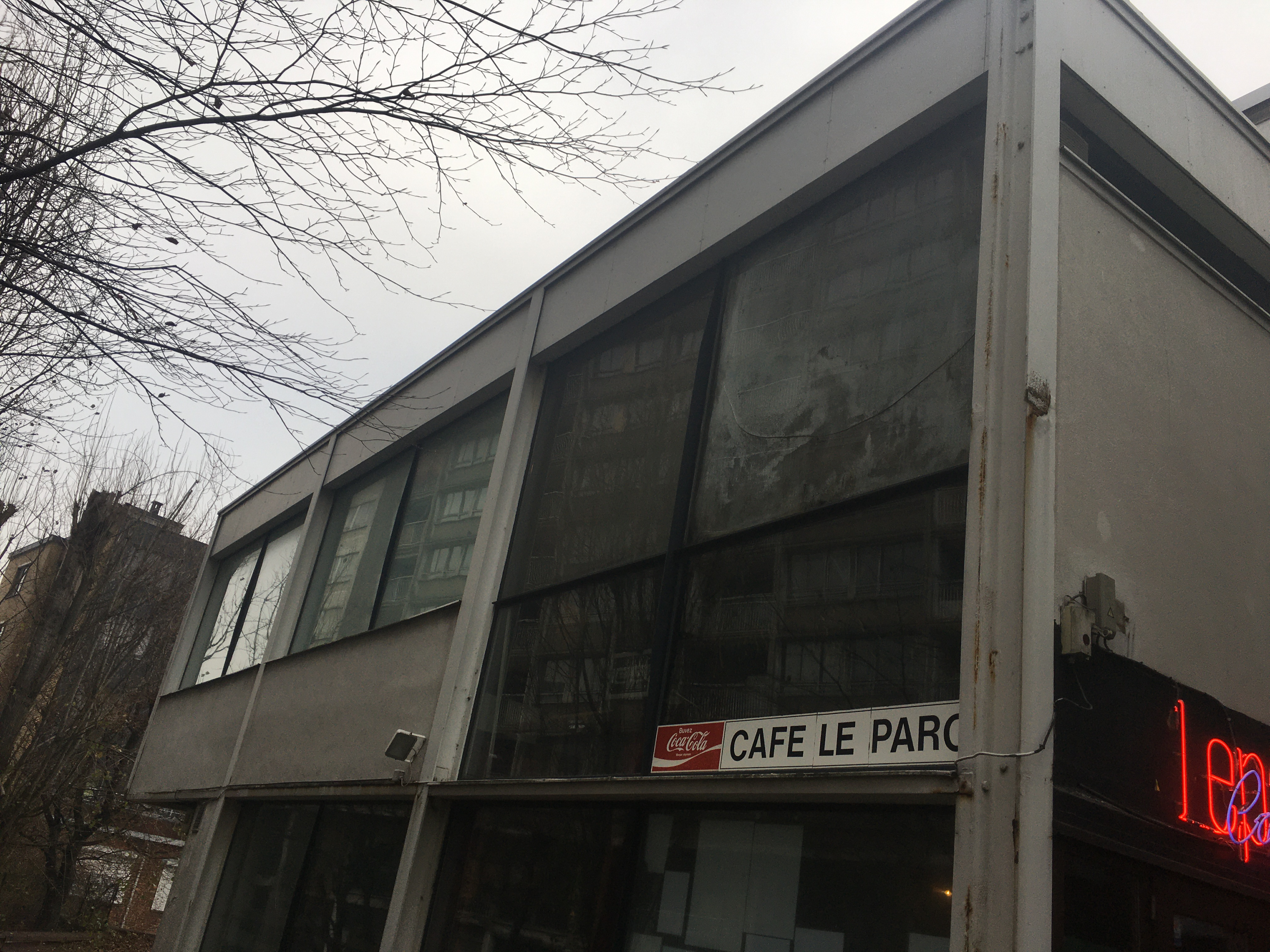 facade café